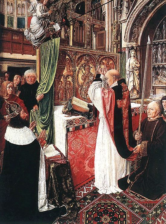 The mass of St. Giles (La Messe de saint Gilles)